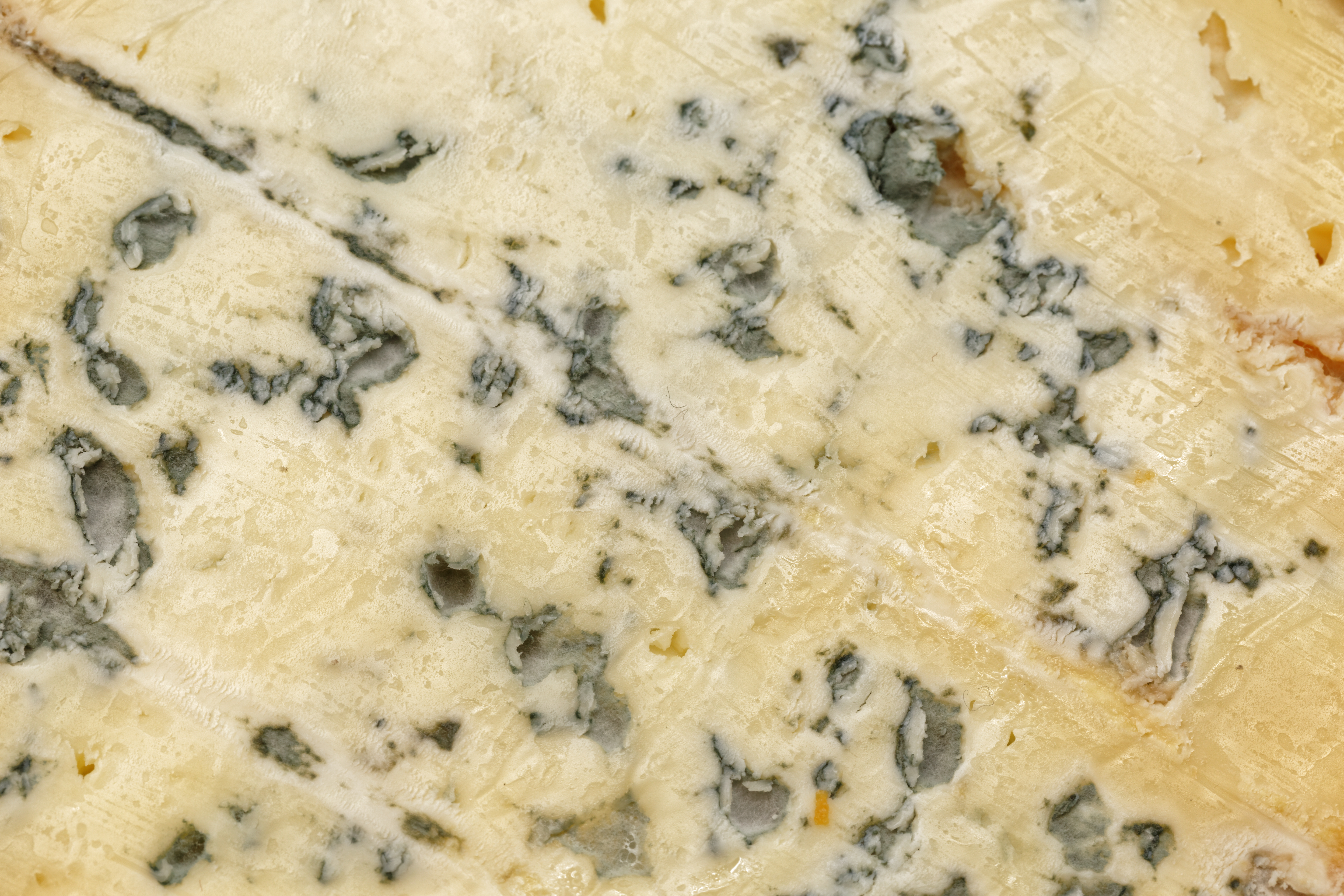 La fourme de Montbrison est un fromage de lait de vache, à pâte persillée.